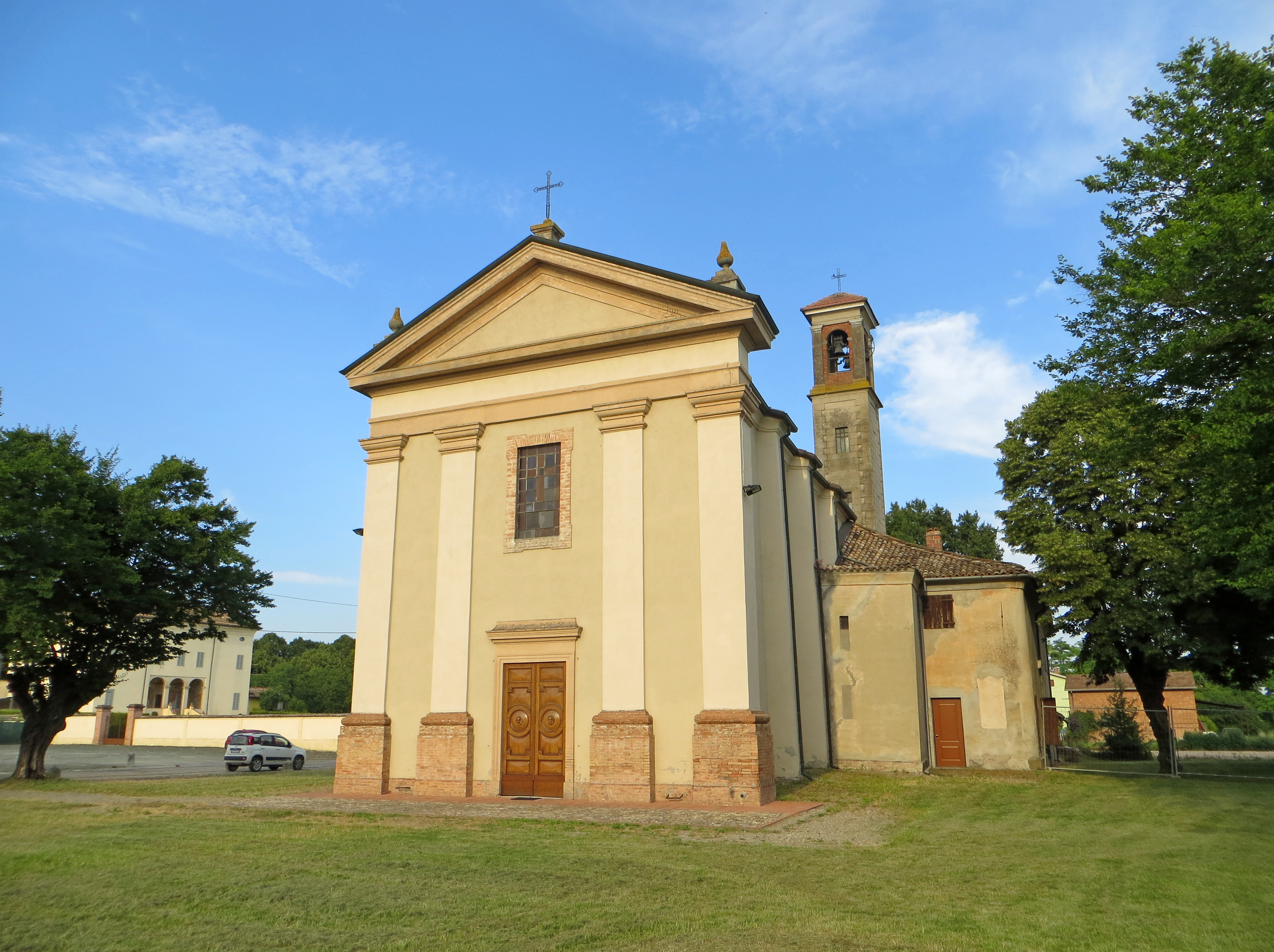 Chiesa di San Pietro (Castellina, Soragna) - facciata